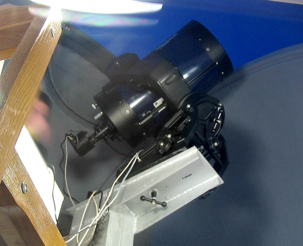 the telescope in Braniborska Tower in Zielona Góra Teleskop obserwatorium na Wieży Braniboerskiej w Zielonej Górze Author:Mohylek 14:08, 2 November 2006 (UTC)